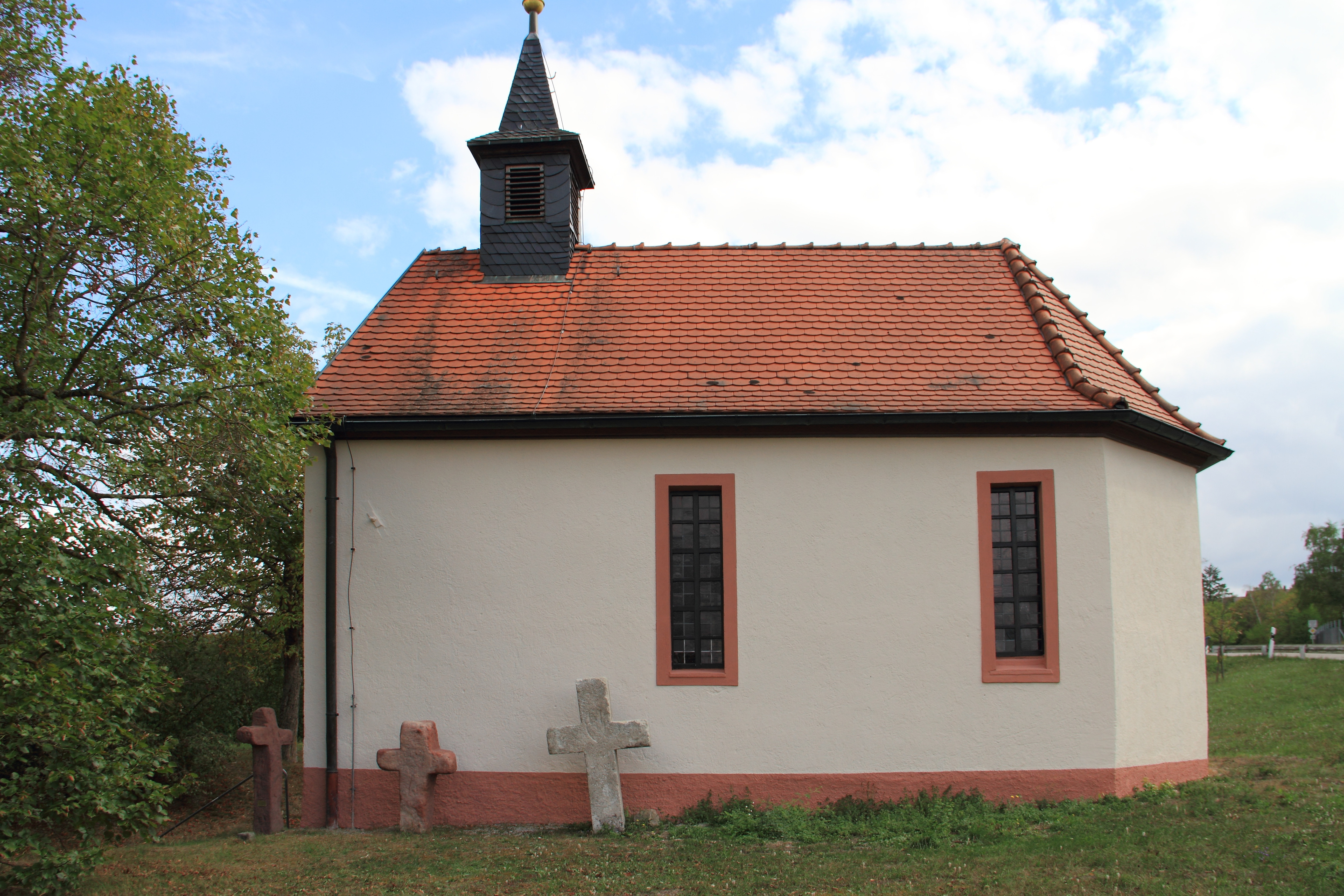 Die Laurentiuskapelle in Tauberbischofsheim mit drei spätmittelalterlichen Sühnekreuzen.